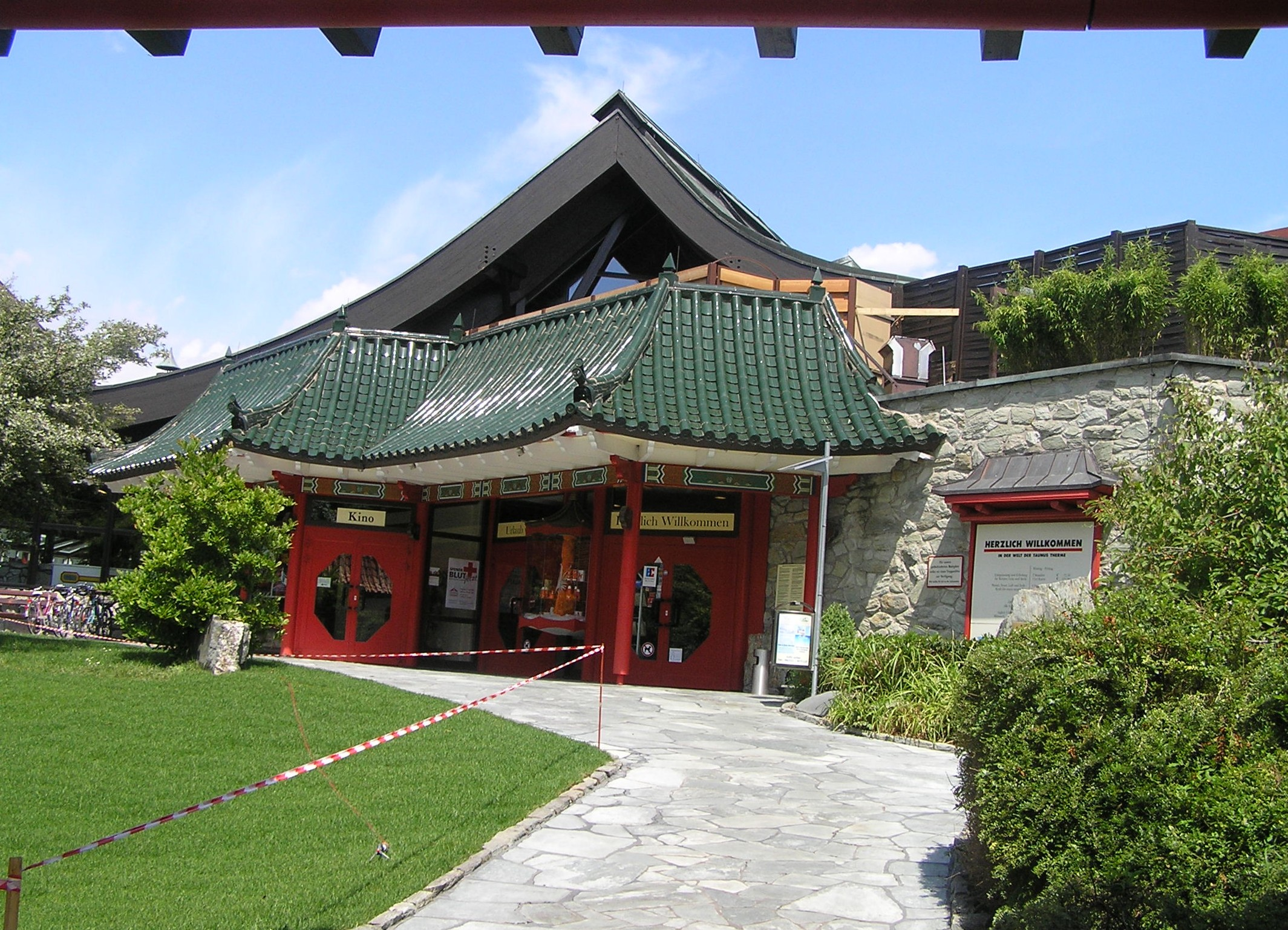 Eingang der Taunus-Therme in Bad Homburg vor der Höhe